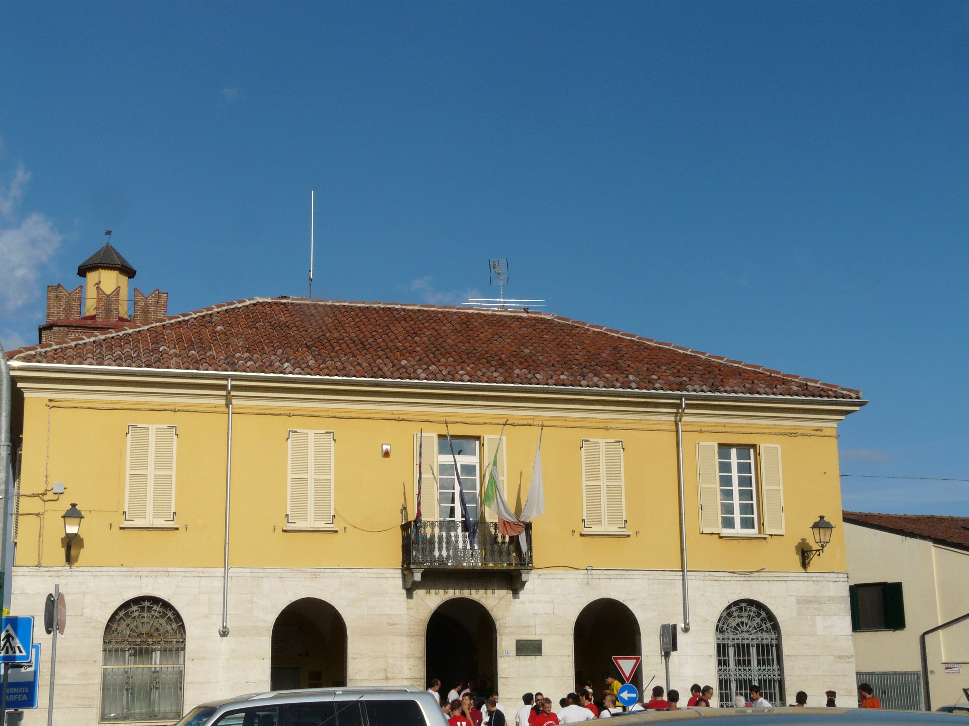 Municipio di Casal Cermelli, Piemonte, Italia